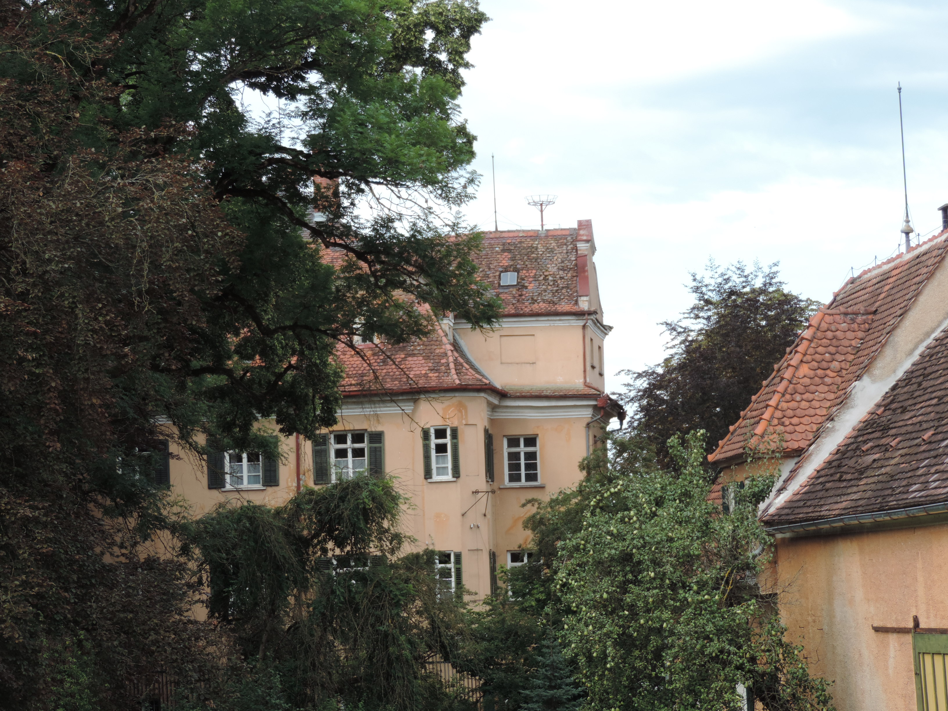 Schloss Burtenbach